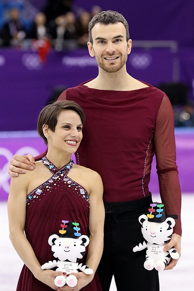 Меган Дюамель и Эрик Рэдфорд на церемонии награждения Олимпийских игр 2018 в Пхёнчхане